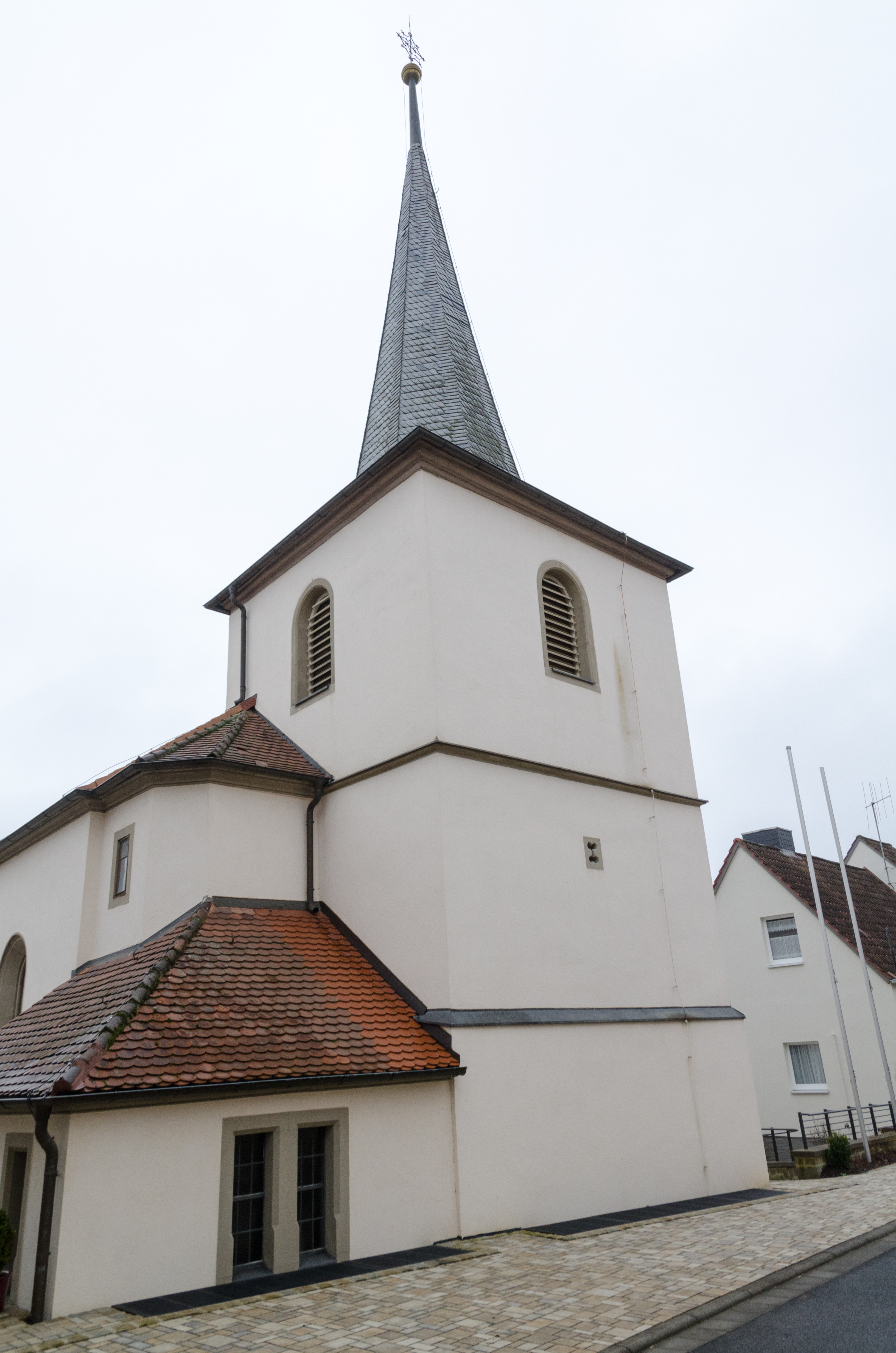 Poppenhausen, Hain, St. Aegidus